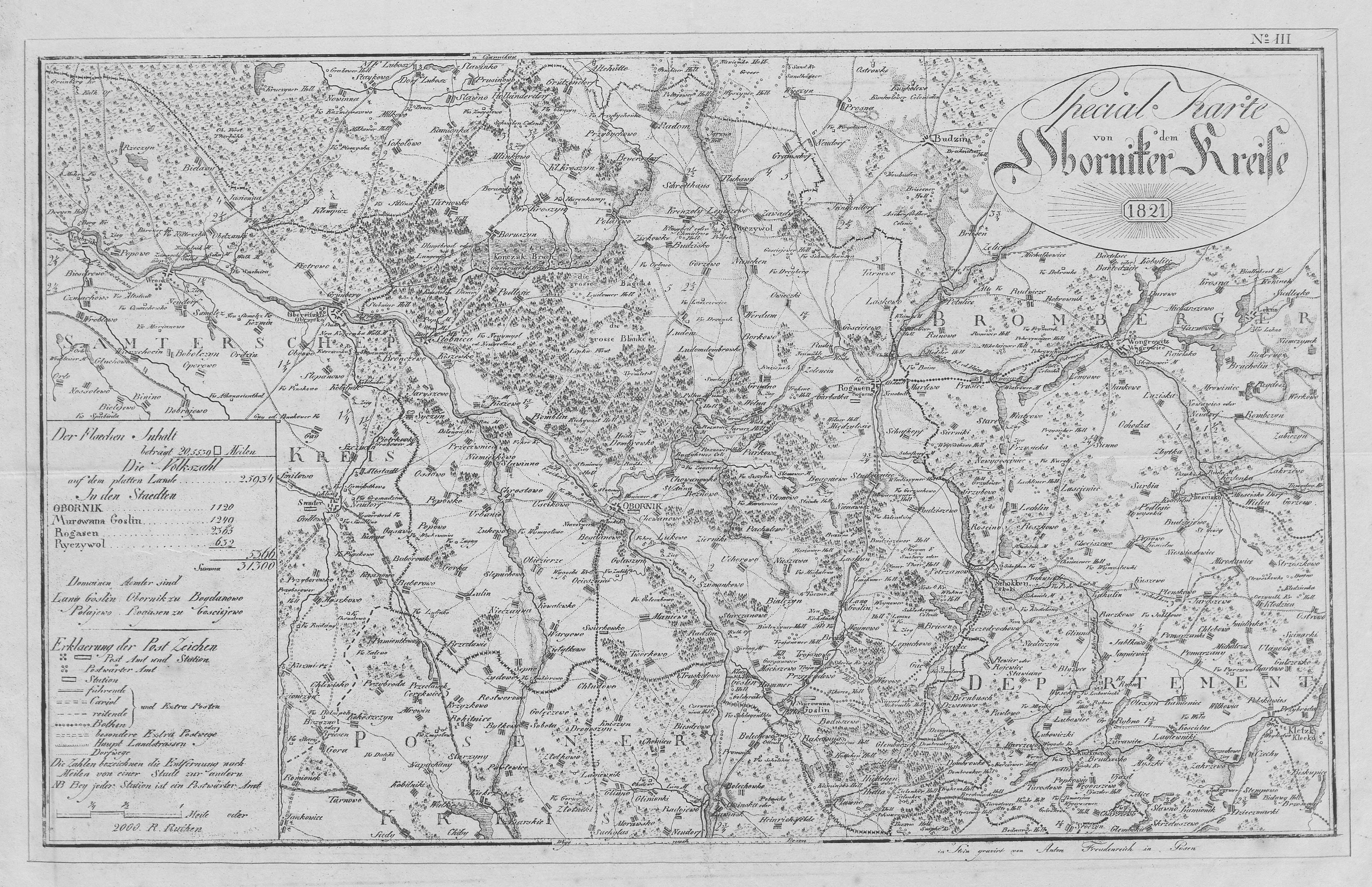 Kreis Obornik as from 1818 to 1919